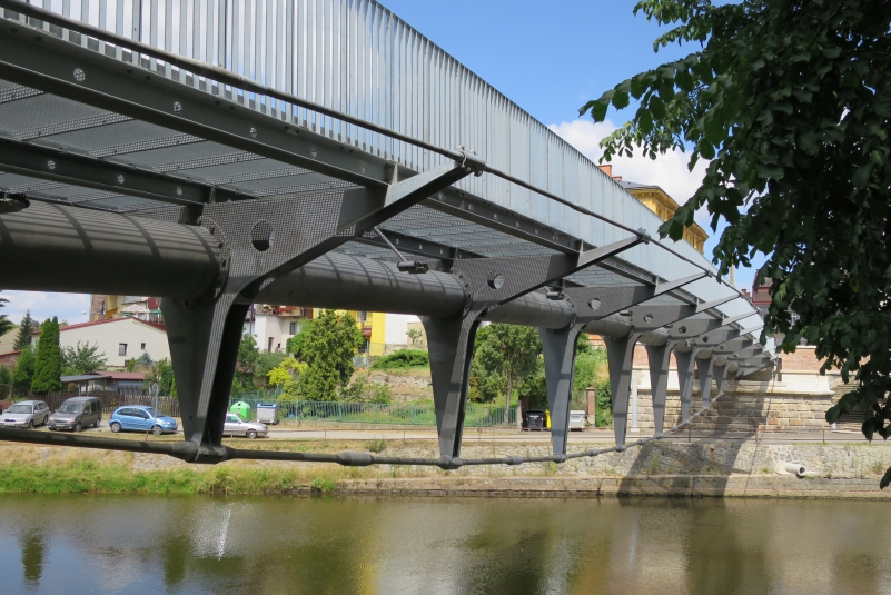 Pěší a cyklistický most v Jaroměři, postavený v letech 2013-2015 a nominovaný na Českou cenu architektury.